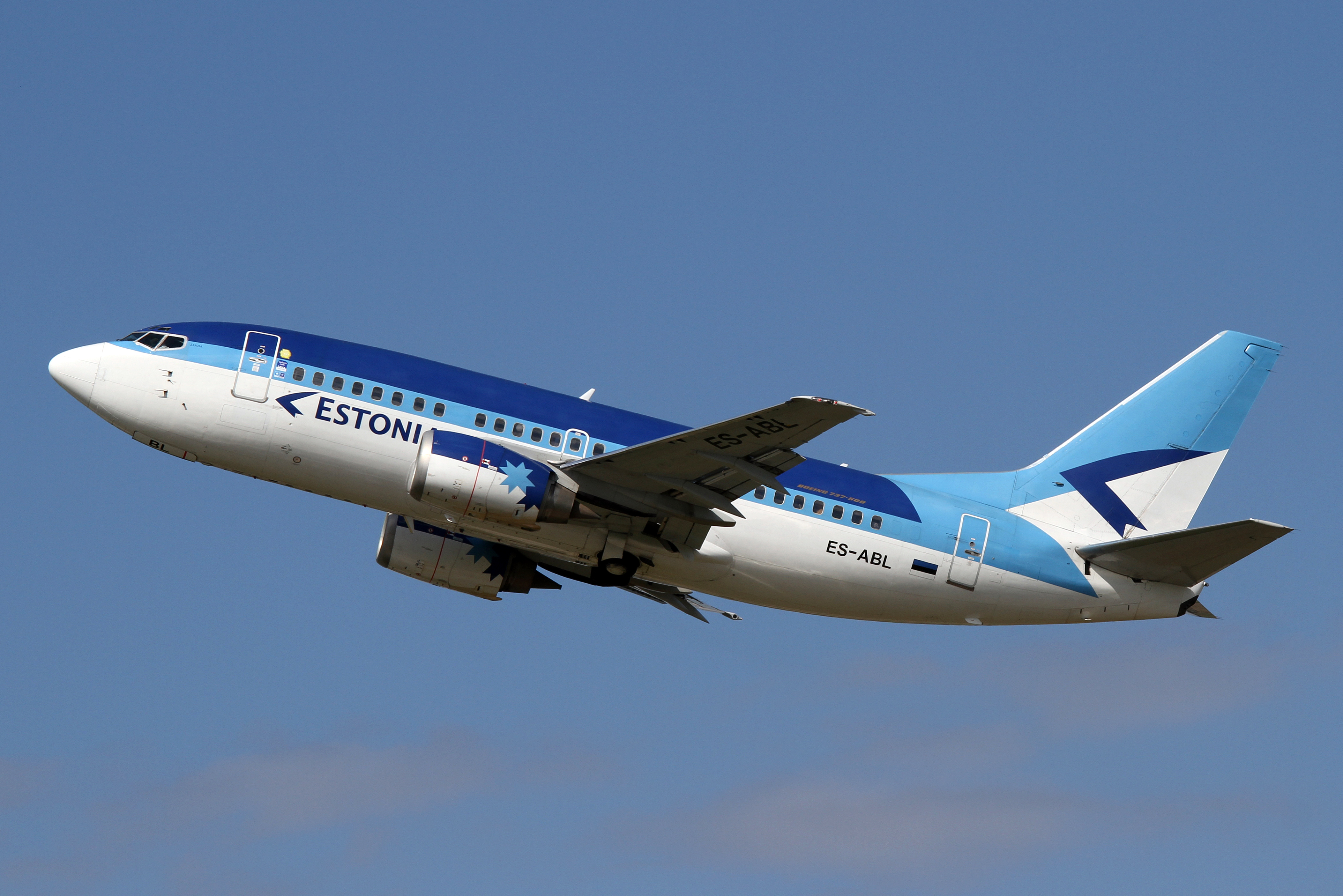 HAJ/EDDV 23-04-12